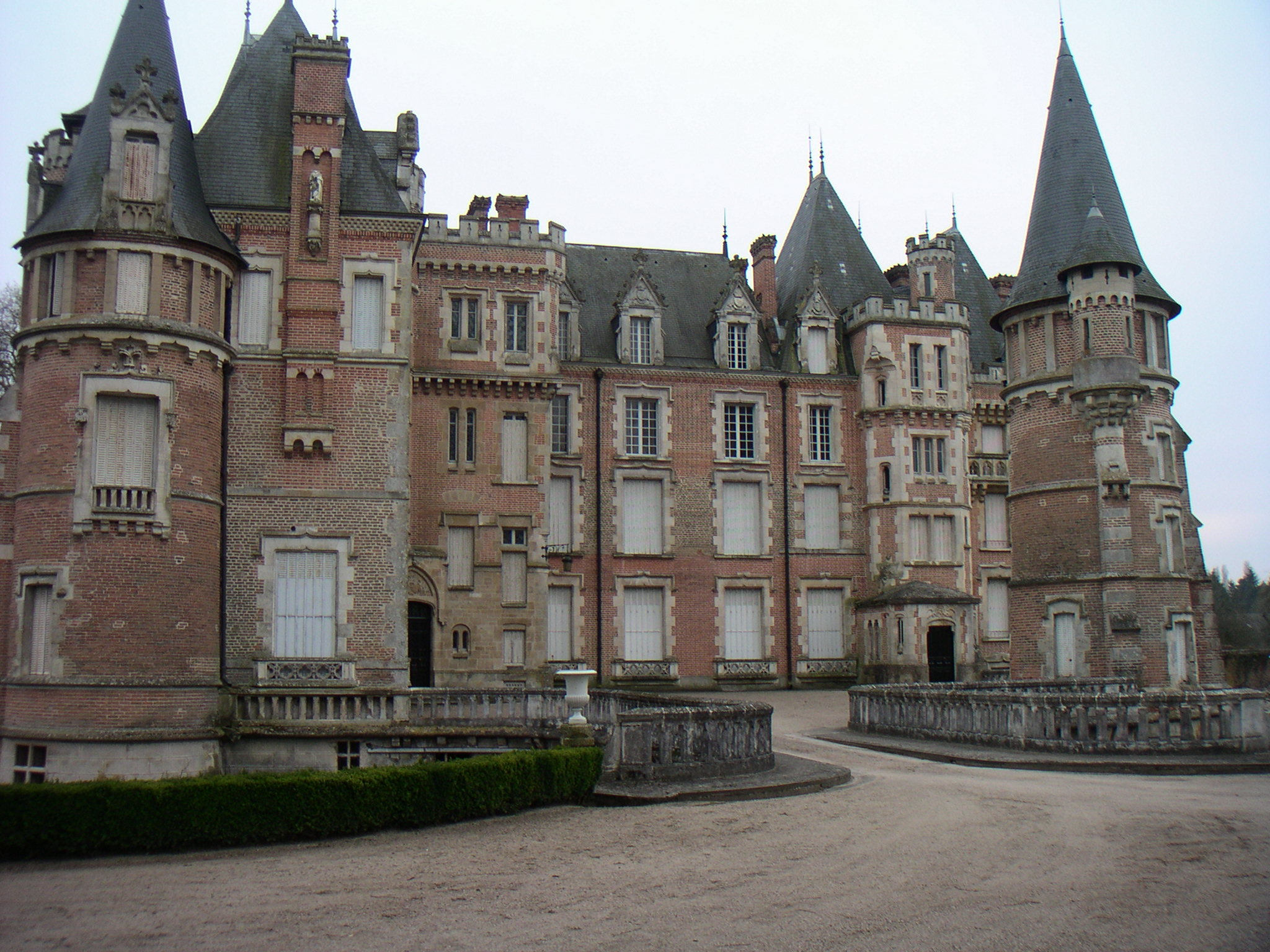 Chateau de Combreux